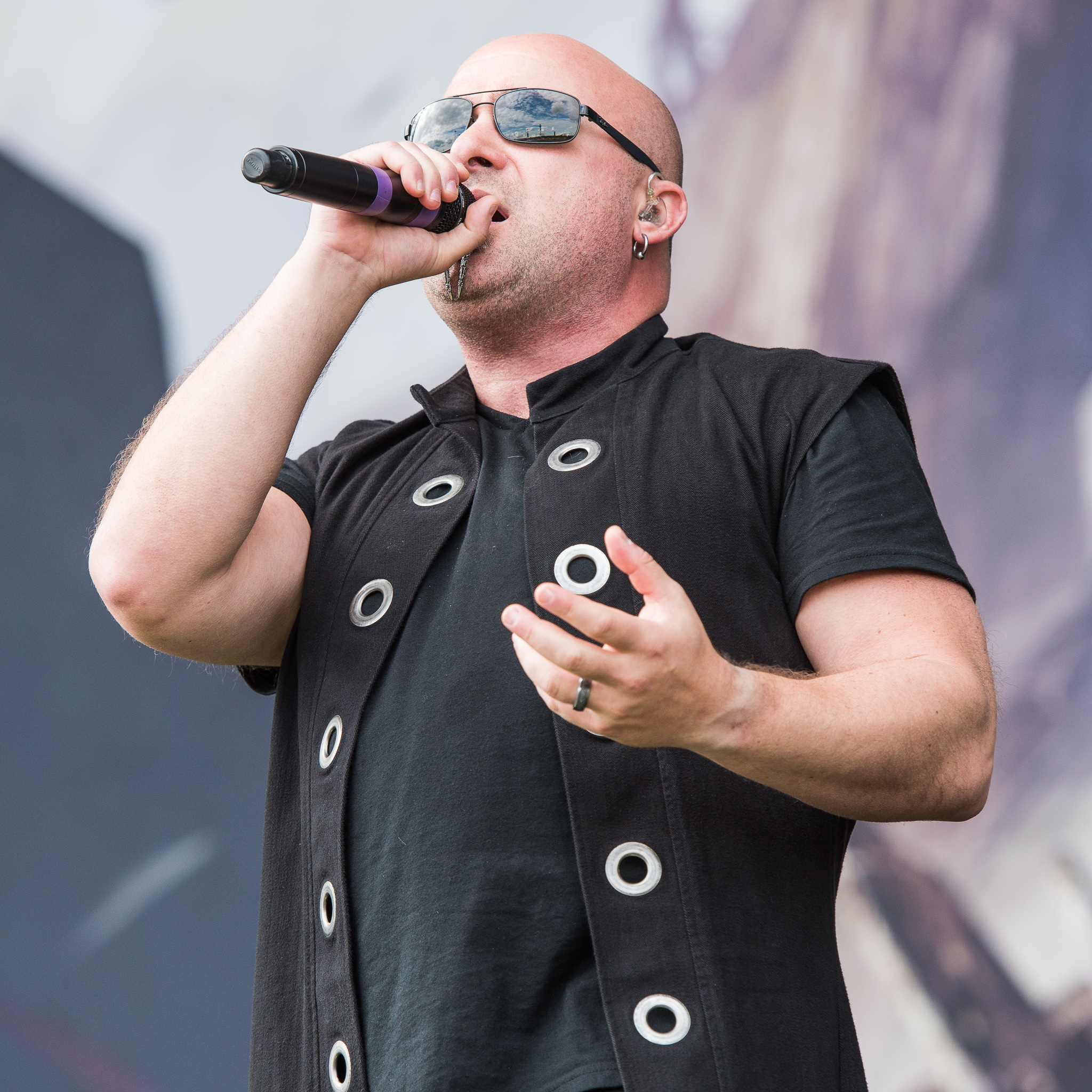 ARGO-Konzerte,David Draiman,Disturbed,Festival,Konzert,Livekonzert,Livemusik,Musik,RiP,Rock im Park 2016,Seat Zeppelin Stage